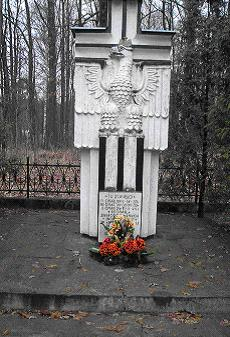 Obelisk upamiętniający ofiary II Wojny Światowej (Pogorzel)